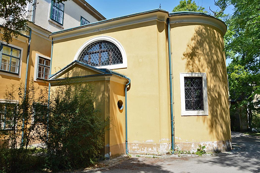 Die Kapelle des ehemaligen Schlosses Hirschstetten